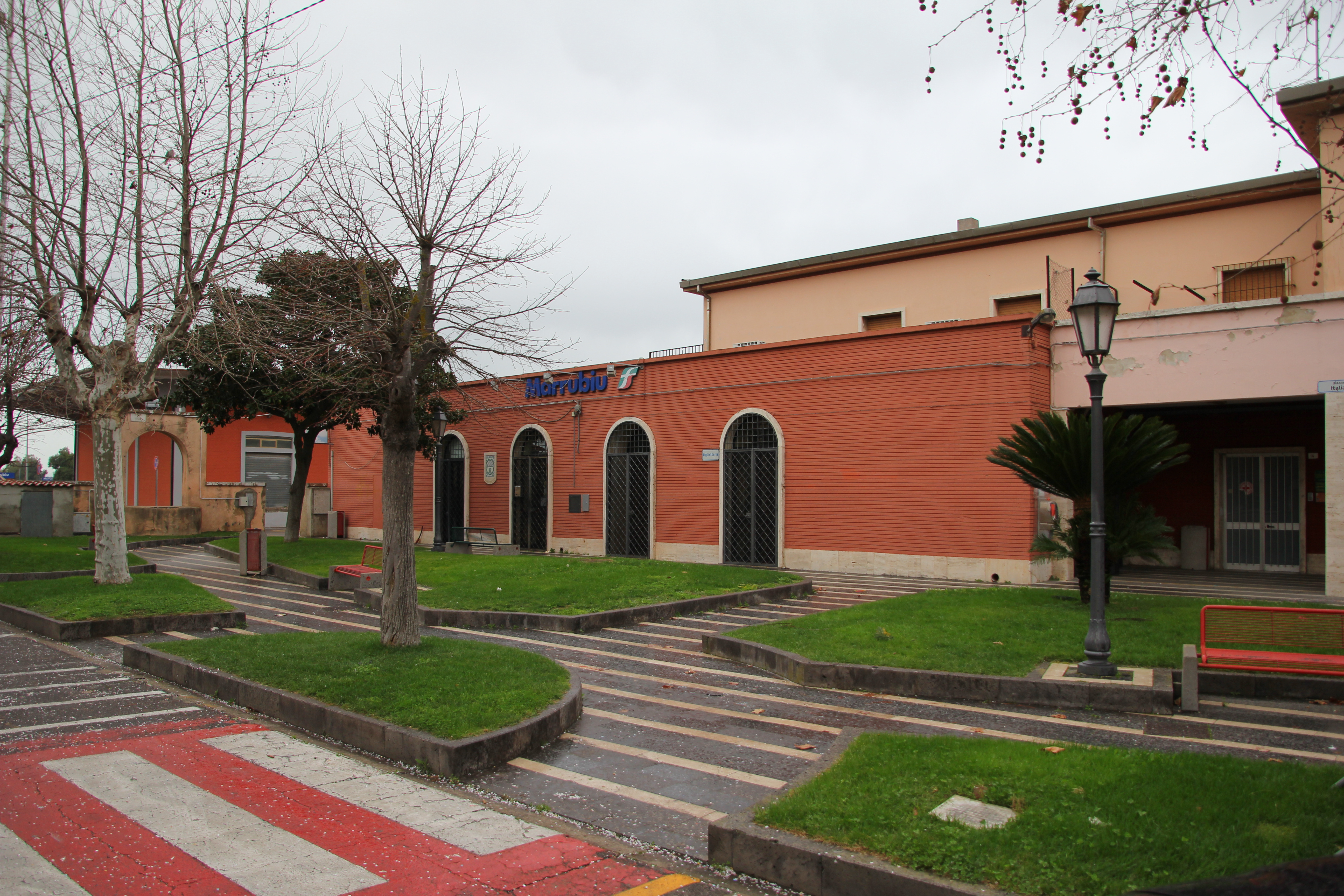 Marrubiu - Stazione ferroviaria